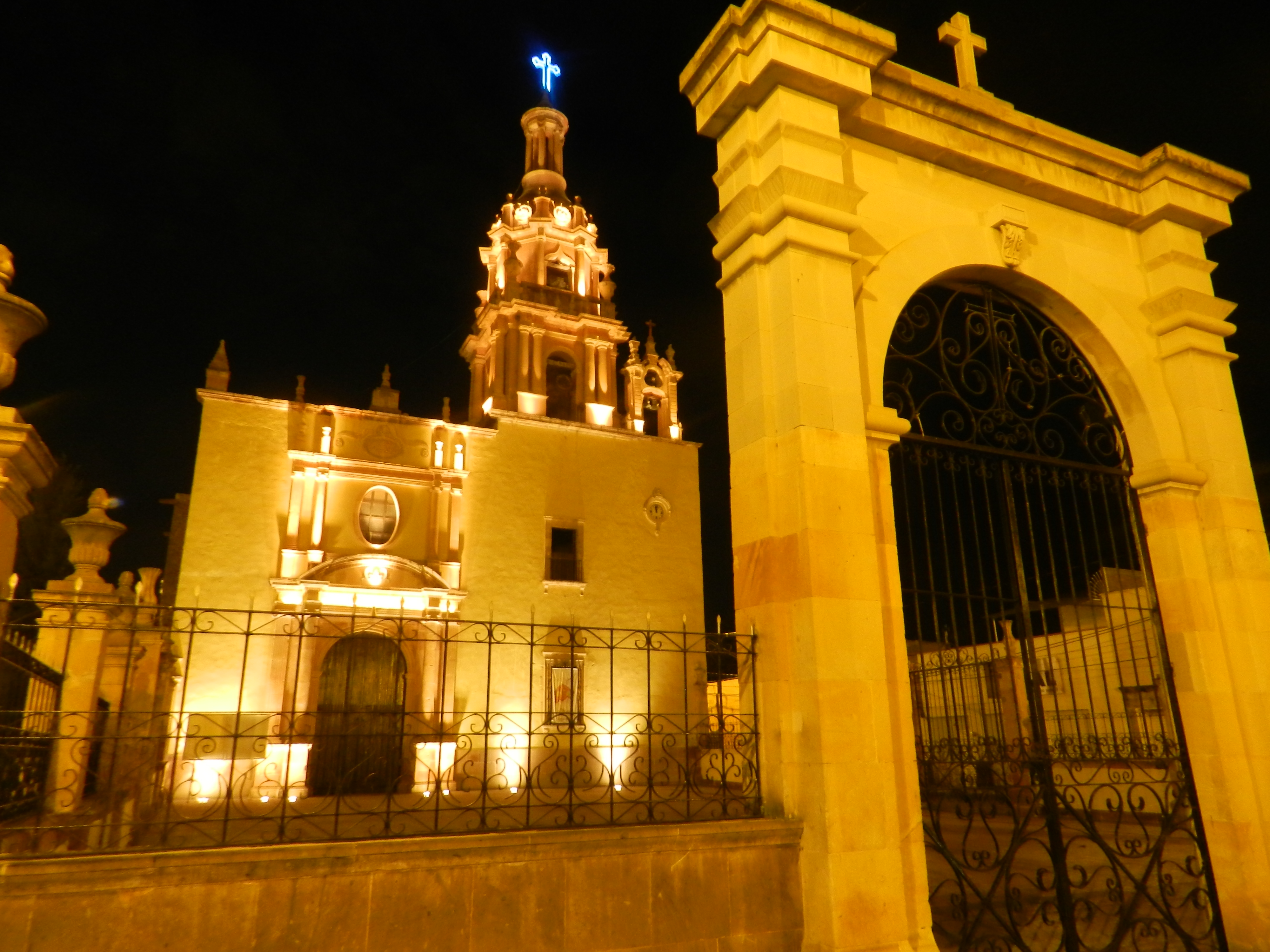 Fachada y atrio del Santuario del Señor de las Angustias en Rincón de Romos, Aguascalientes, México